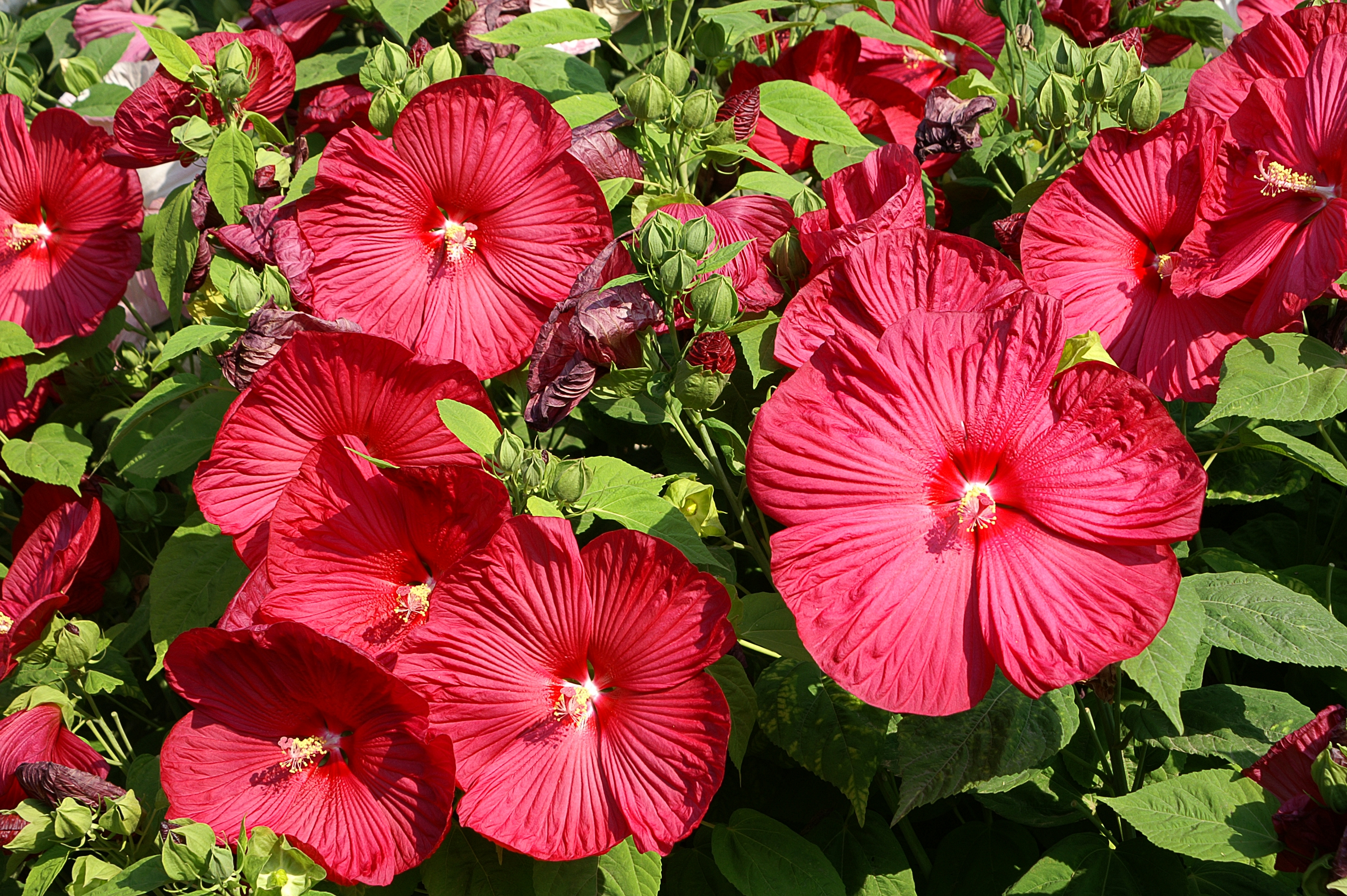 L'Hibiscus moscheutos est une espèce de plantes vivaces ligneuses à grandes fleurs (jusqu'à 25 cm) de la famille des Malvacées, originaire d'Amérique du Nord.